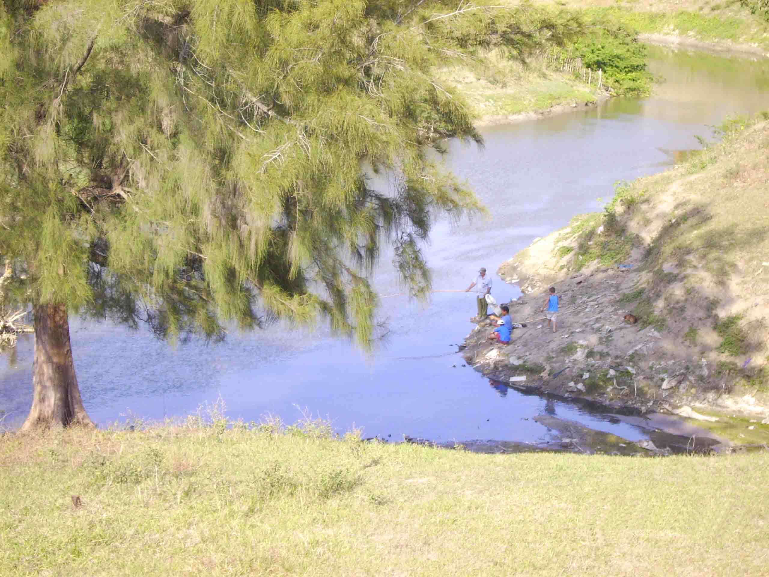 Río Jatibonico del Sur